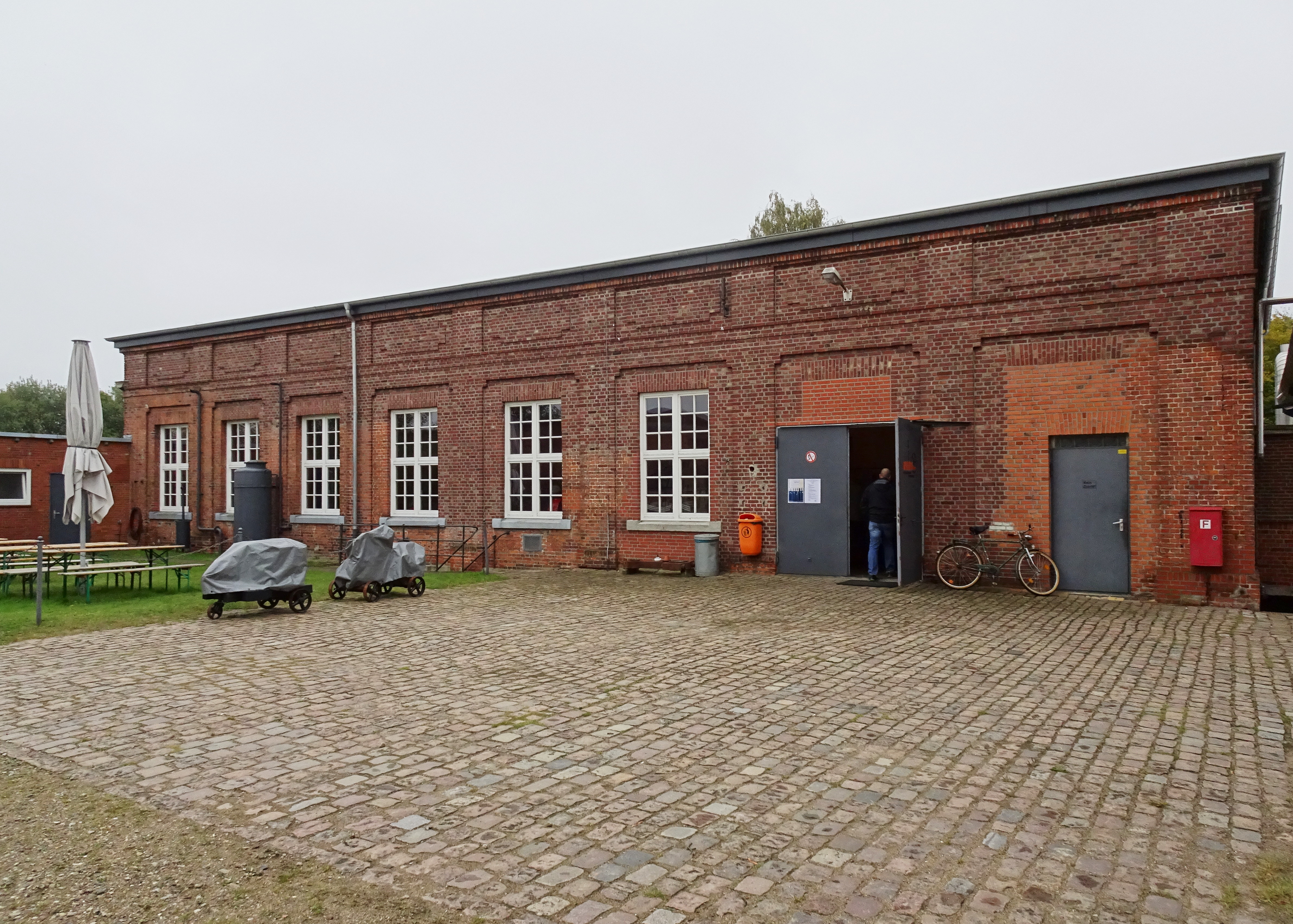 Maschinenmuseum Kiel-Wik, Hauptgebäude (ehem. Gaswerk Wik), denkmalgeschützt